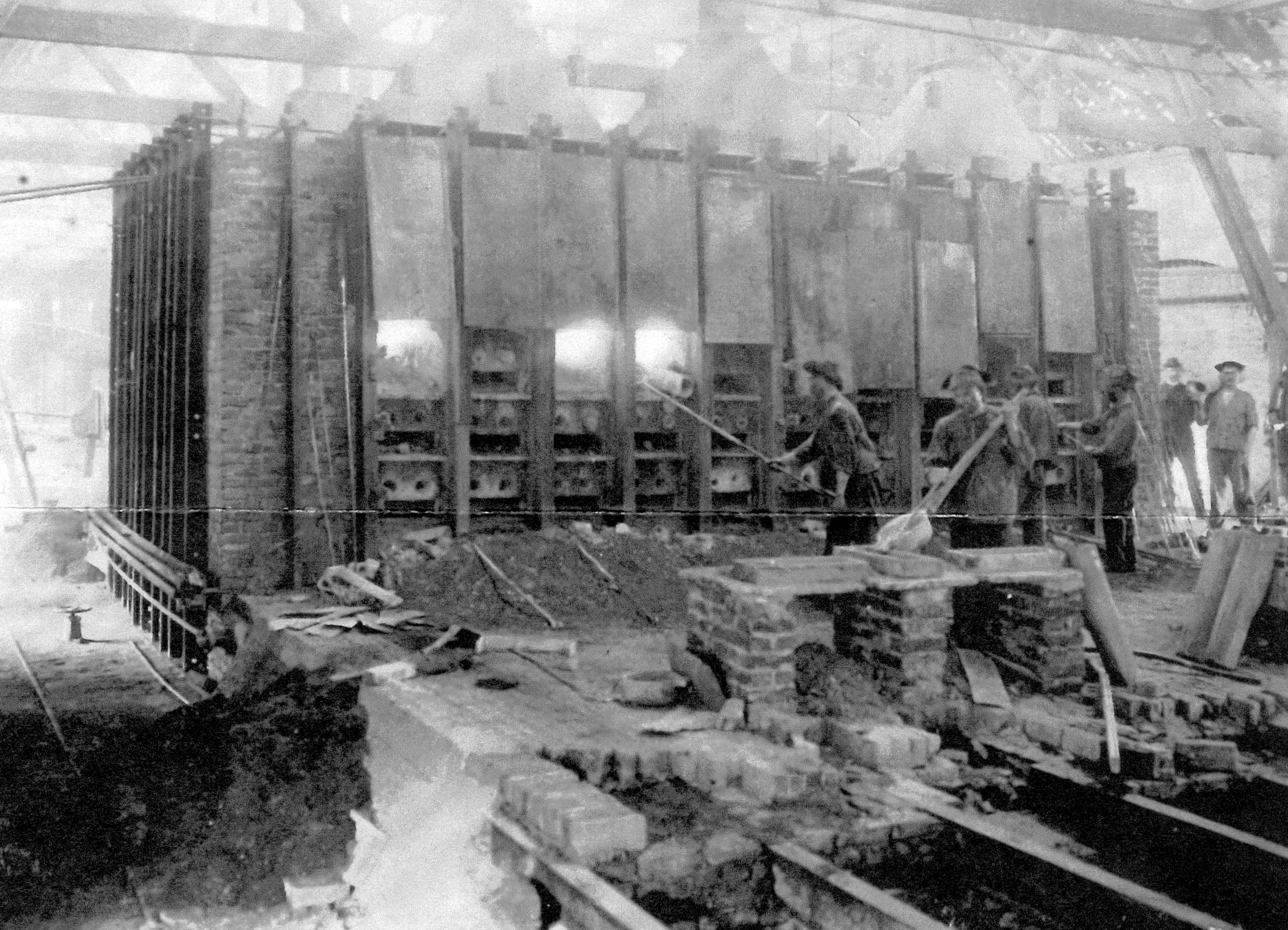 Bedienung eines Muffelofens